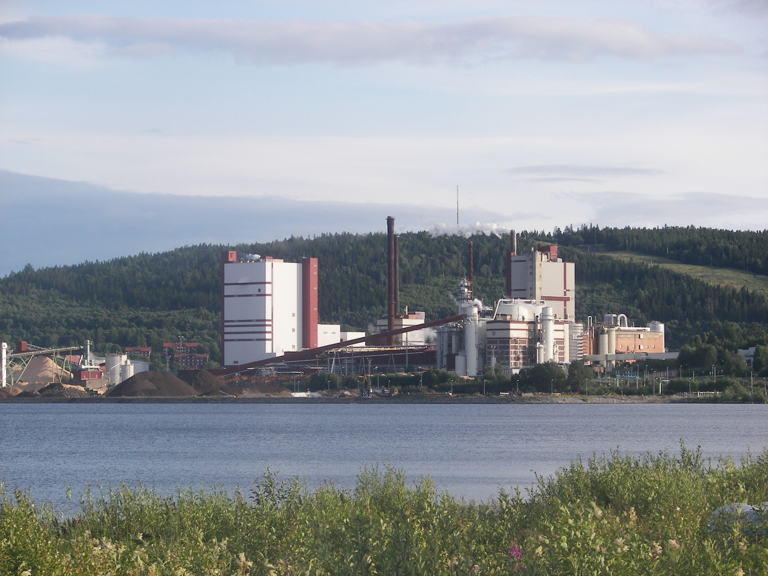 SCA Östrand sett från Vivstavarv.